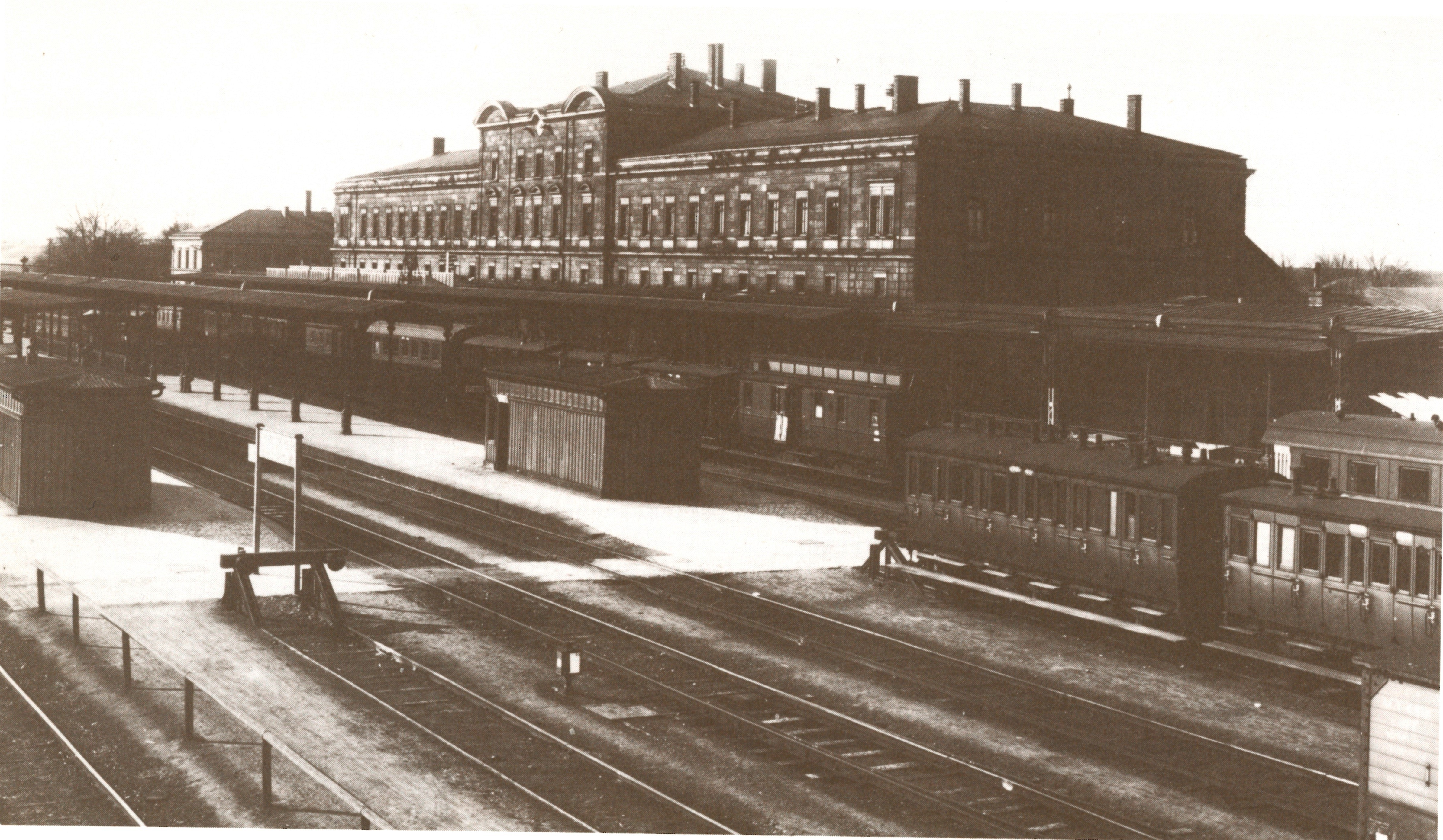 Schweinfurt Fotografie um 1903: Blick auf den Hauptbahnhof von der 1903 errichteten Fußgängerbrücke.